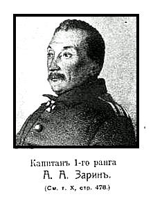 Это изображение было использовано для иллюстрирования статьи «Зарин, Апполинарий Александрович» опубликованной в десятом томе «Военной энциклопедии», который был издан книгоиздательским товариществом И. Д. Сытина в 1912—1913 гг. в столице Российской империи городе Санкт-Петербурге.